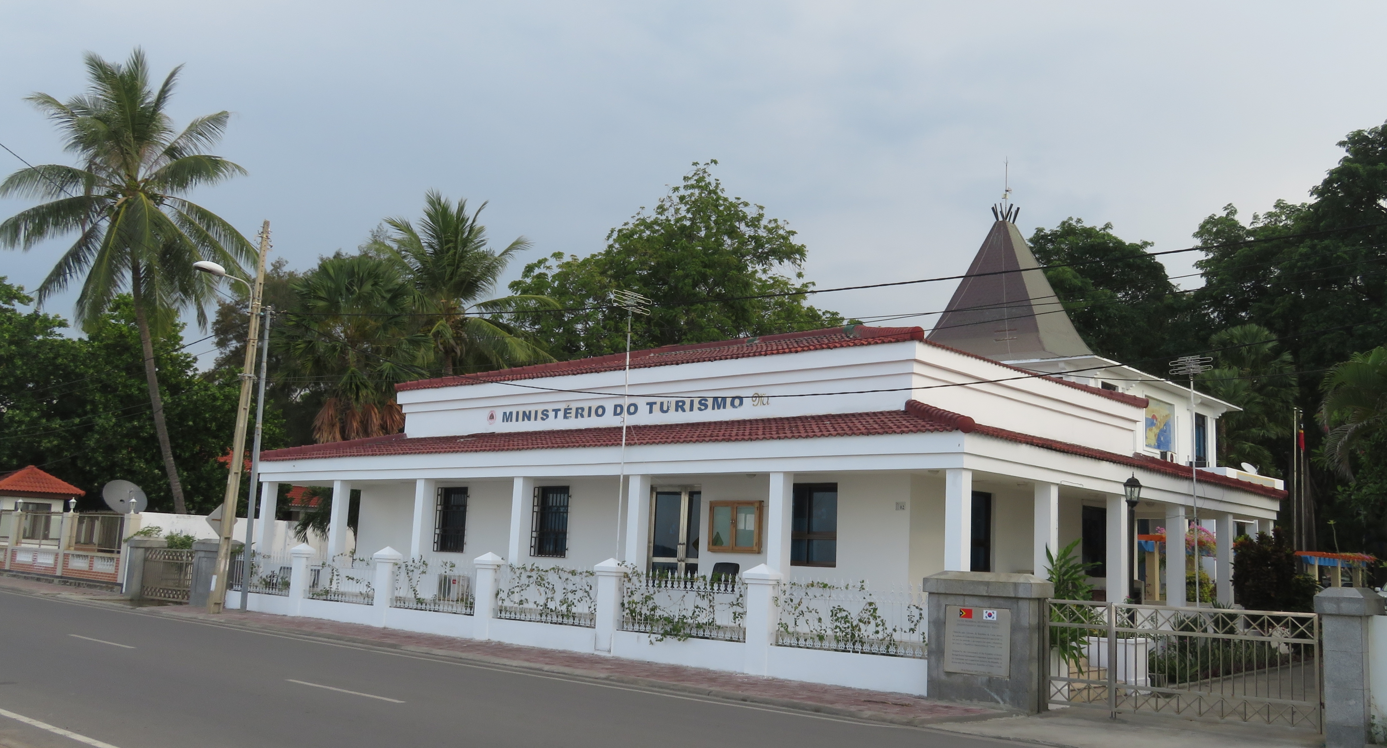 Ministério do Turismo, Dili,Timor Leste